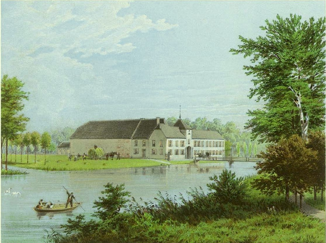 Haus Diesdonk, Kreis Geldern, Rhein-Provinz